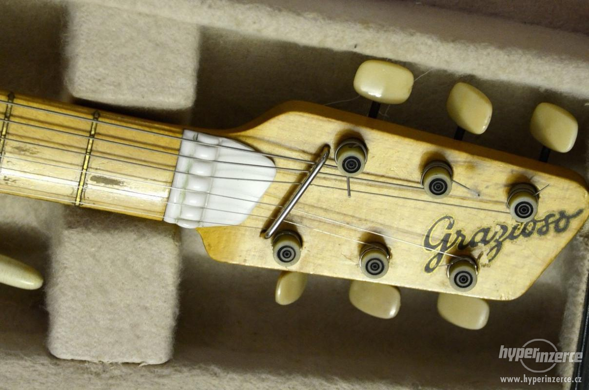 Clavijero de una Resonet "Grazioso" Futurama de Maple.